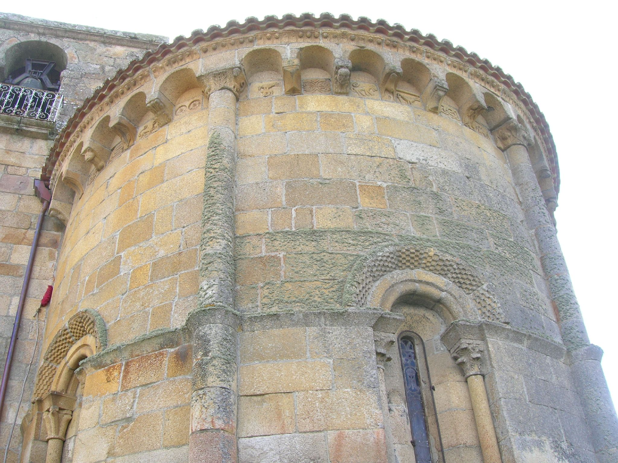 Absida da igrexa de Santa María de Castrelo de Miño, no concello de Castrelo de Miño